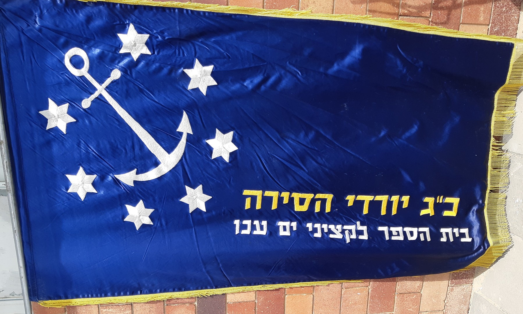 דגל הכבוד הרקום של בית הספר לקציני ים עכו